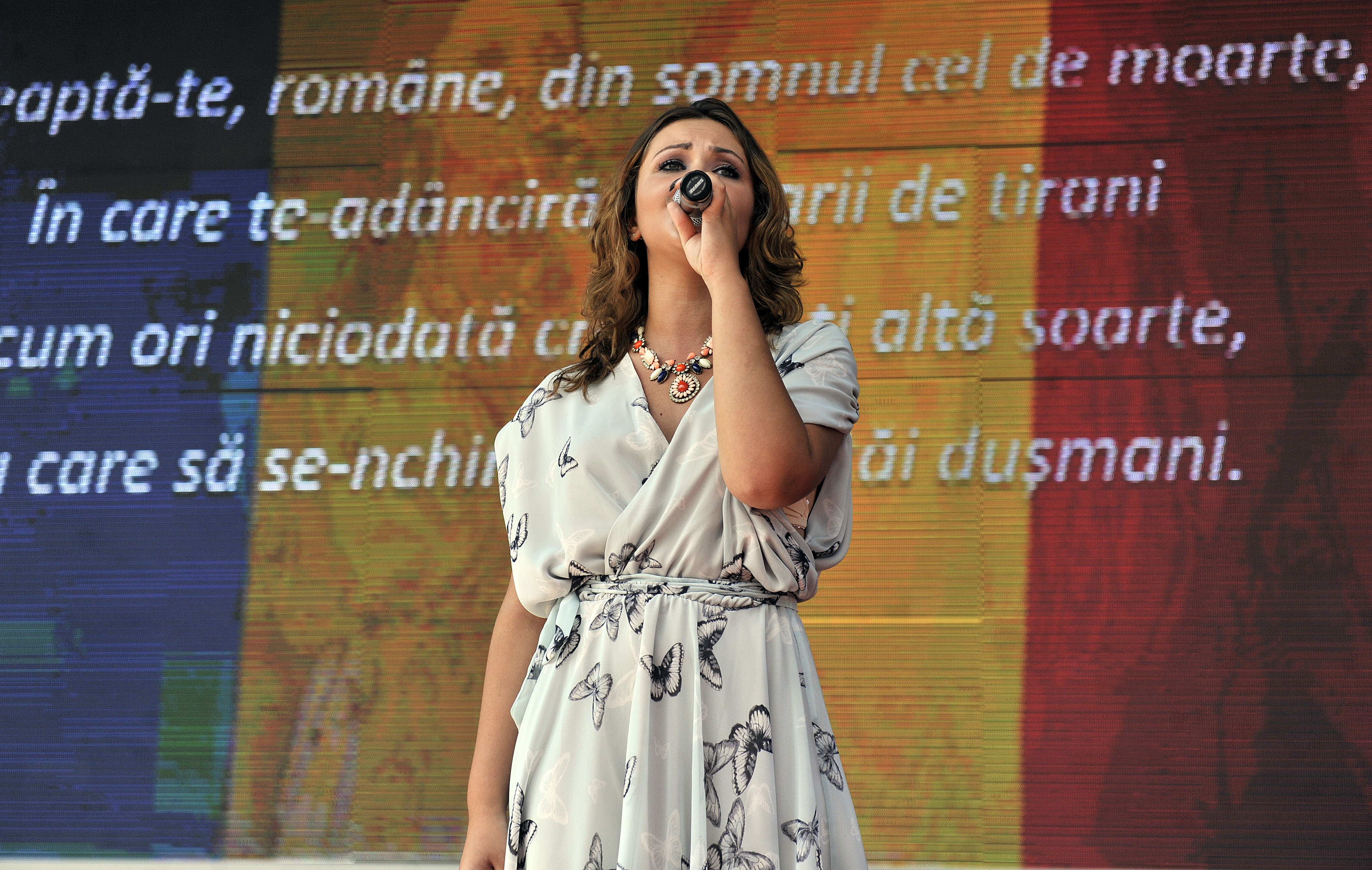 Evenimentul #TSDRULZ, Constanta - 05.09 (3)